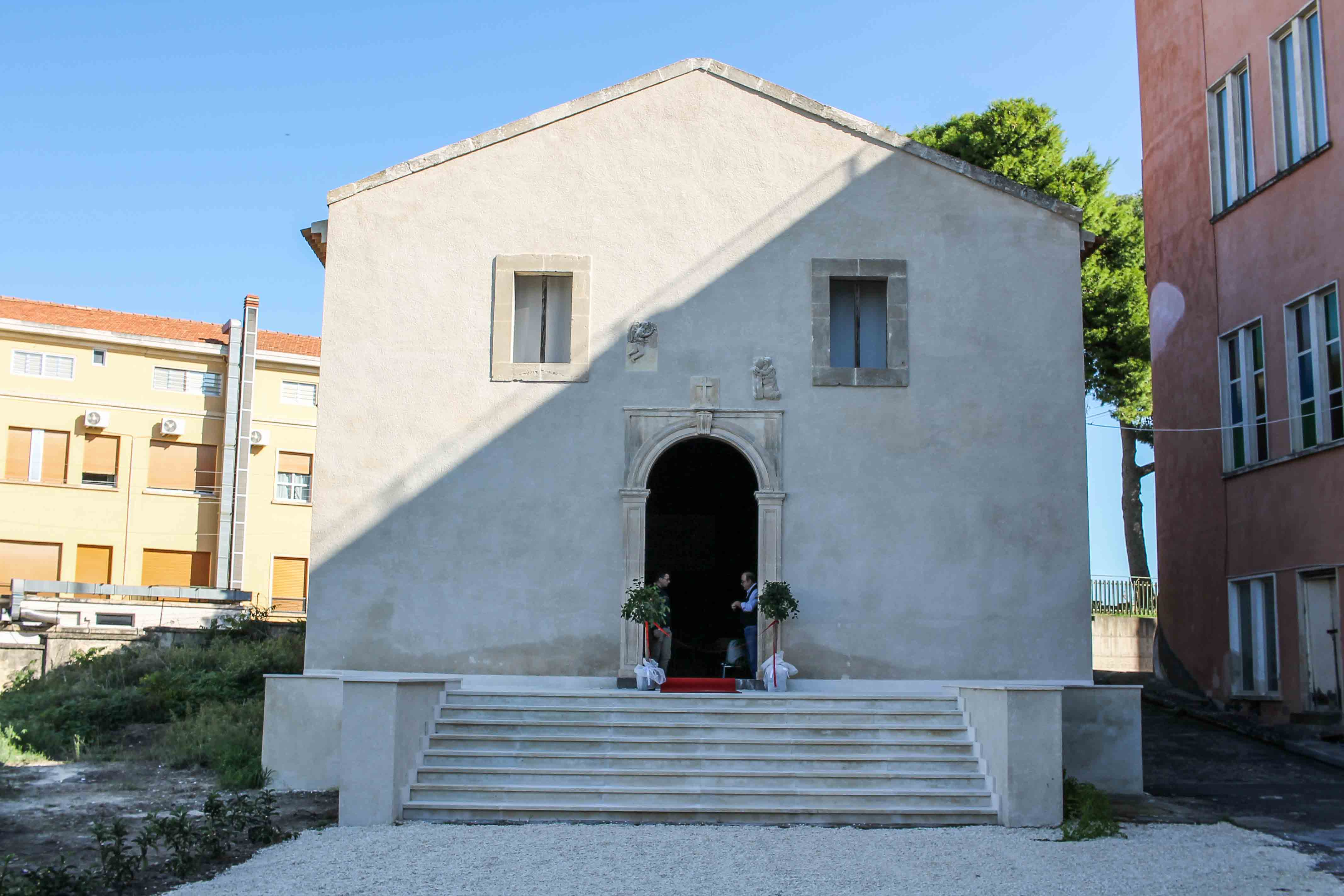 La chiesa e l'attuale convento delle Carmelitane sorgono sull'area occupata una volta dal convento dei Minori Osservanti, eretto nel 1470. La chiesa annessa all'antico convento fu dedicata a Santa Maria di Gesu' dal vescovo di Malta, Antonio Alagona. Il nome di Maria Santissima della Catena si deve ad una statua di alabastro che il Barone Sebastiano Sgalambro compro' a Venezia e fece trasportare a Lentini, facendone dono alla chiesa. In questa chiesa venivano seppelliti i nobili della citta' di Lentini, in sontuosi monumenti funebri. Tra questi ricordiamo Eleonora Branciforti, che venne tumulata in un mausoleo di marmo bianco di notevole bellezza e pregio artistico, attualmente esposto nel museo di Palazzo Bellomo a Siracusa. Distrutti dal terremoto del 1693, la chiesa e il convento furono ricostruiti nello stesso luogo, Soppresso e abbattuto l'antico convento, rimase solo l'attuale chiesetta.